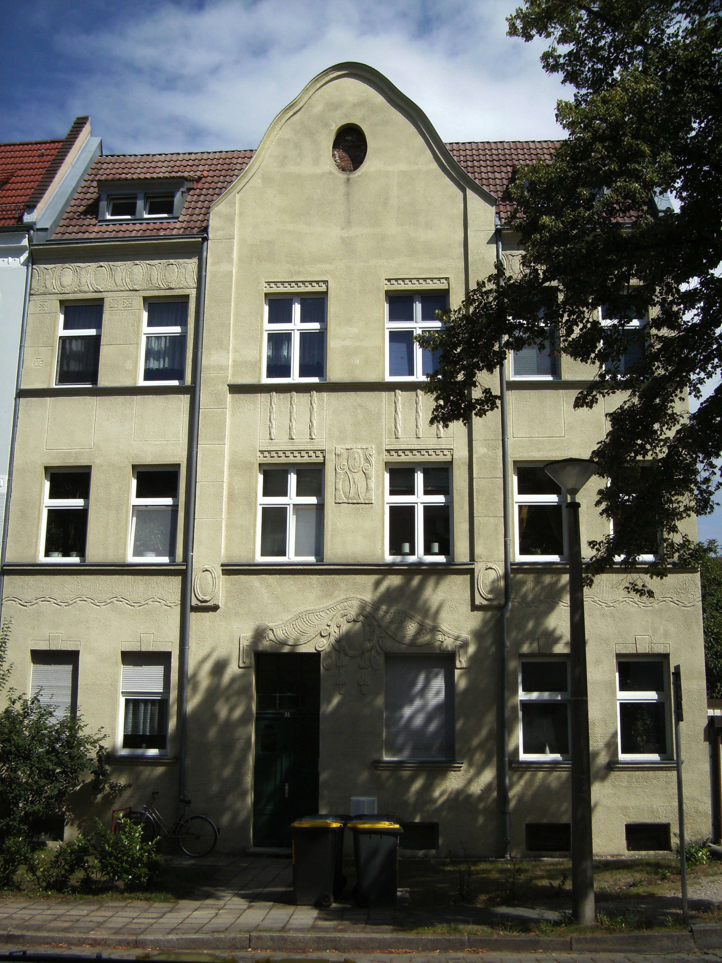 Wernerstr. 34